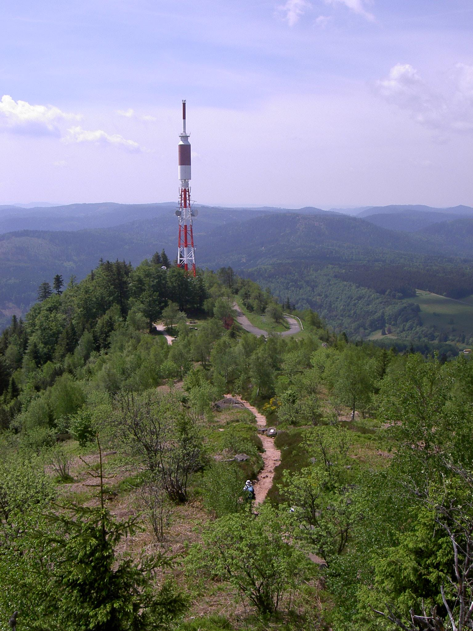 Vogesen 2007 - Donon, Bas-Rhin (67)